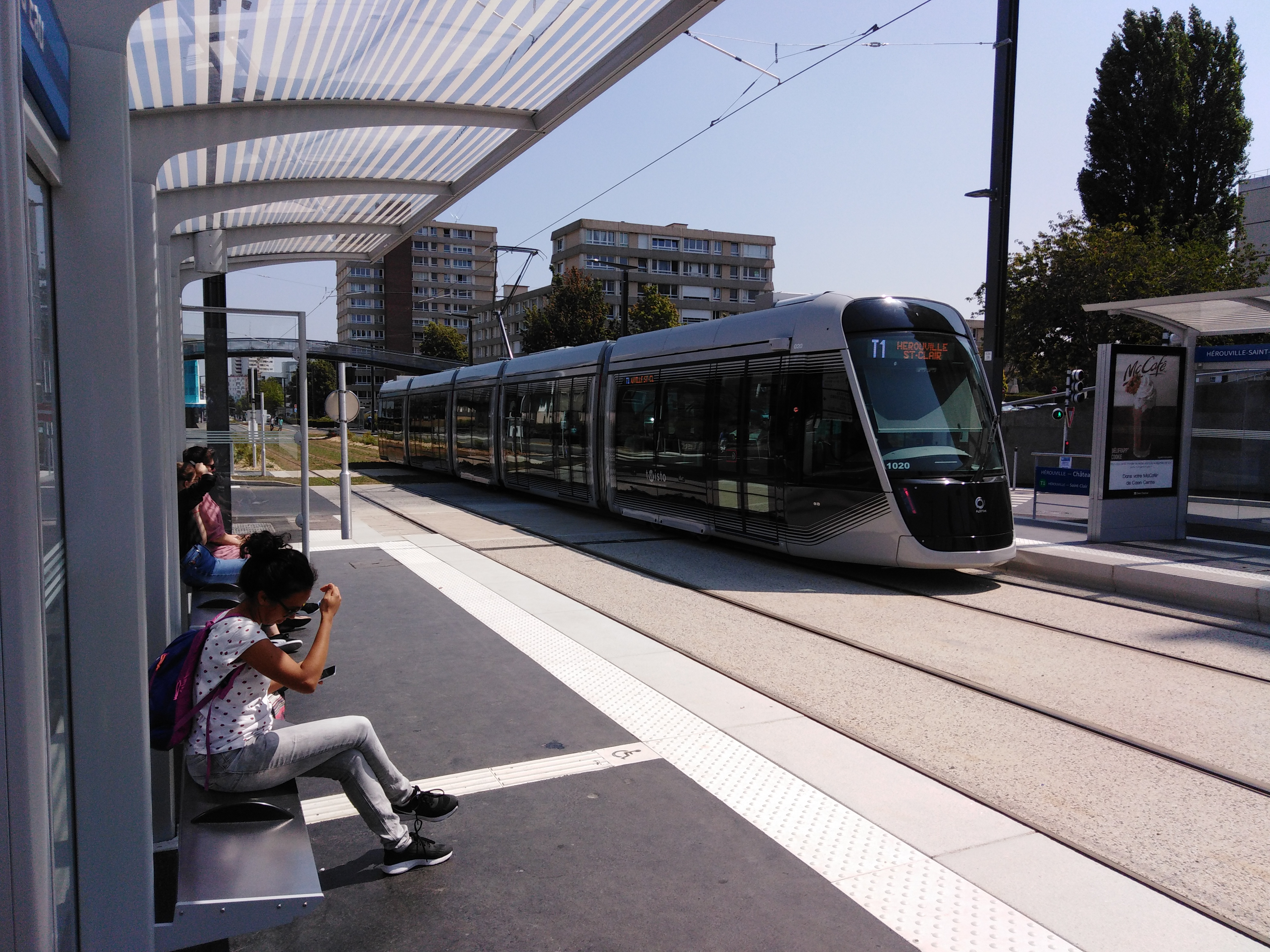 Tramway de Caen, ligne T1, station Château d'Eau, Hérouville-Saint-Clair